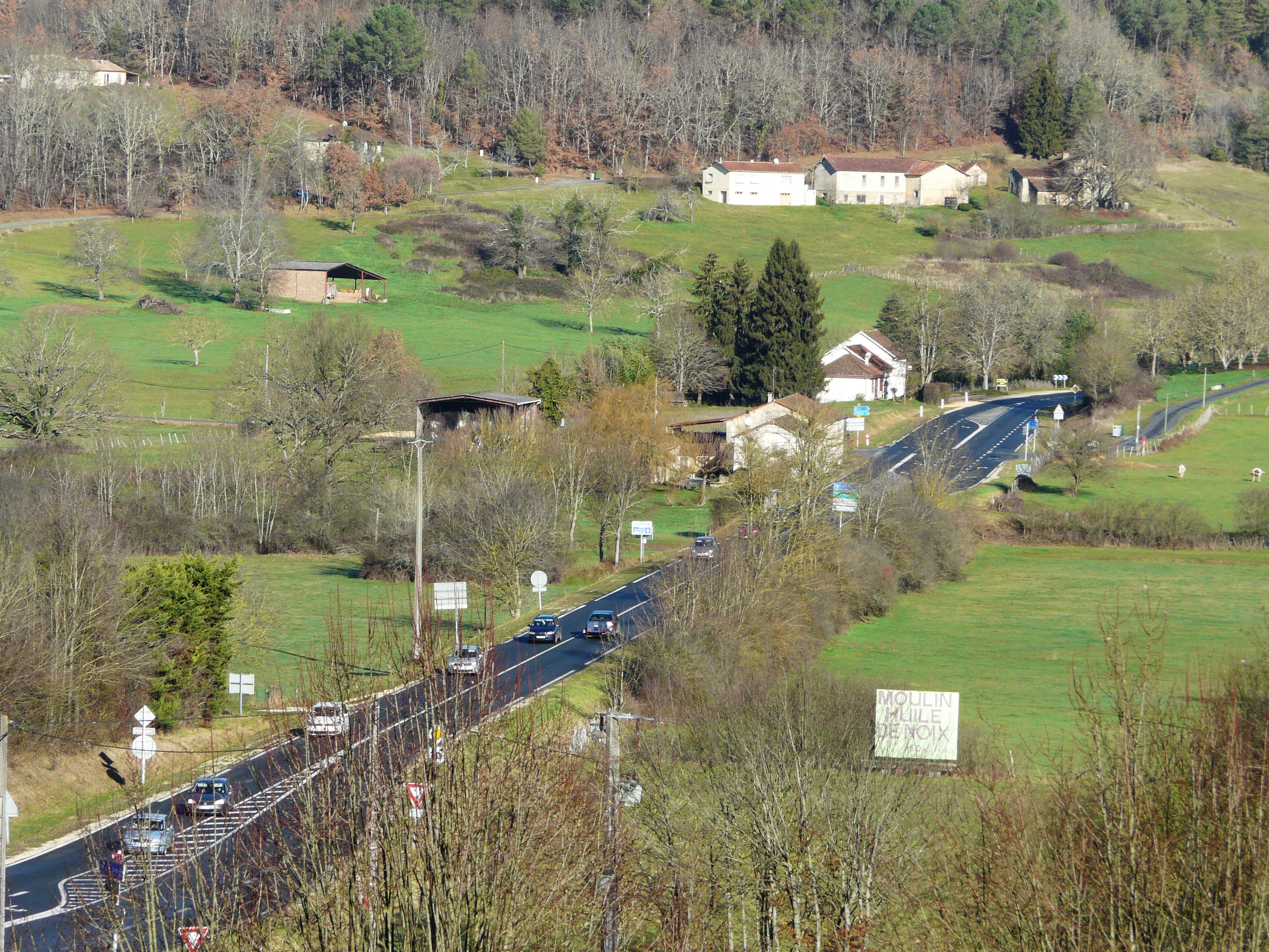 La route nationale 21 à Bordas, Grun-Bordas, Dordogne, France.